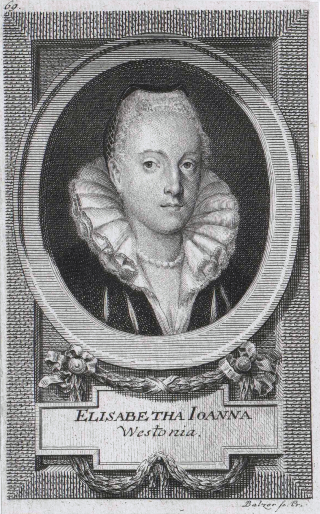 Johanna Elisabeth von West (1582-1612)